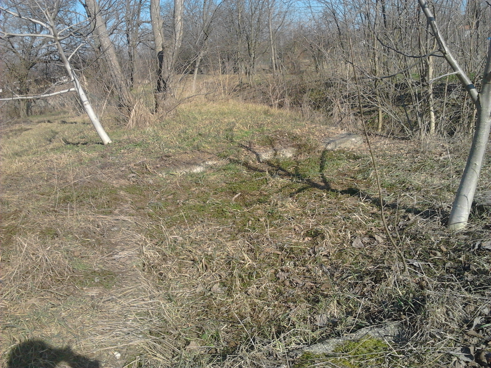 A régi Szabó-malom alapjainak maradványai 2015-ben Maklár déli részén.